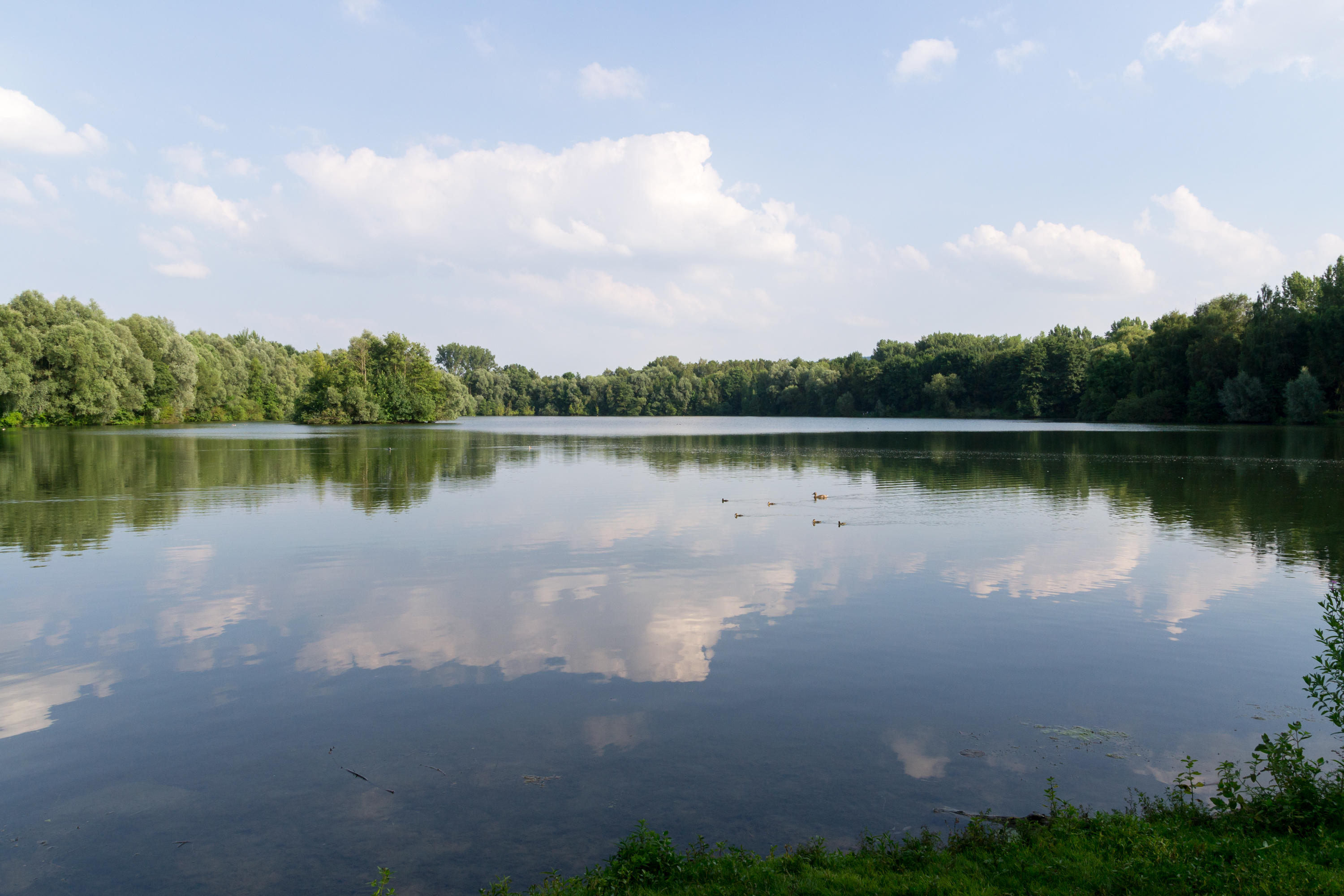 Meschesee in Detmold